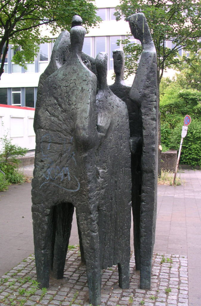 Aachen, Skulptur vor der RWTH-Hochschulbibliothek am Templergraben